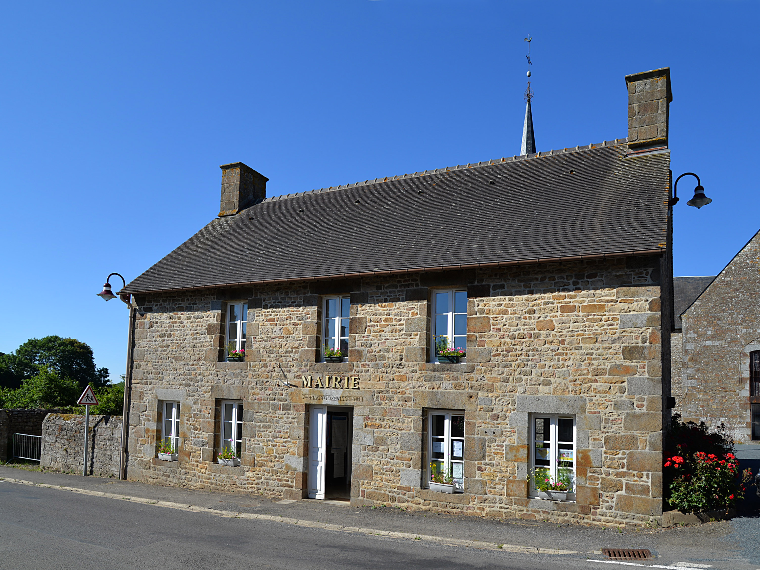 Sainte-Opportune (Orne)